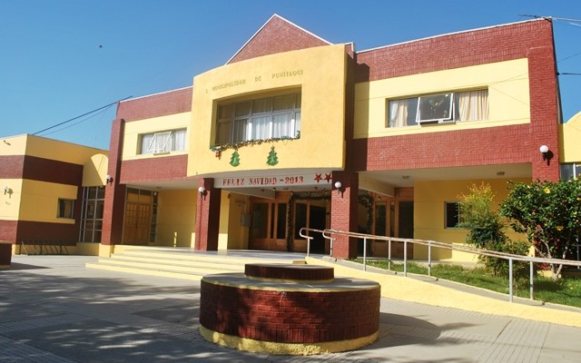 Munipunitaqui